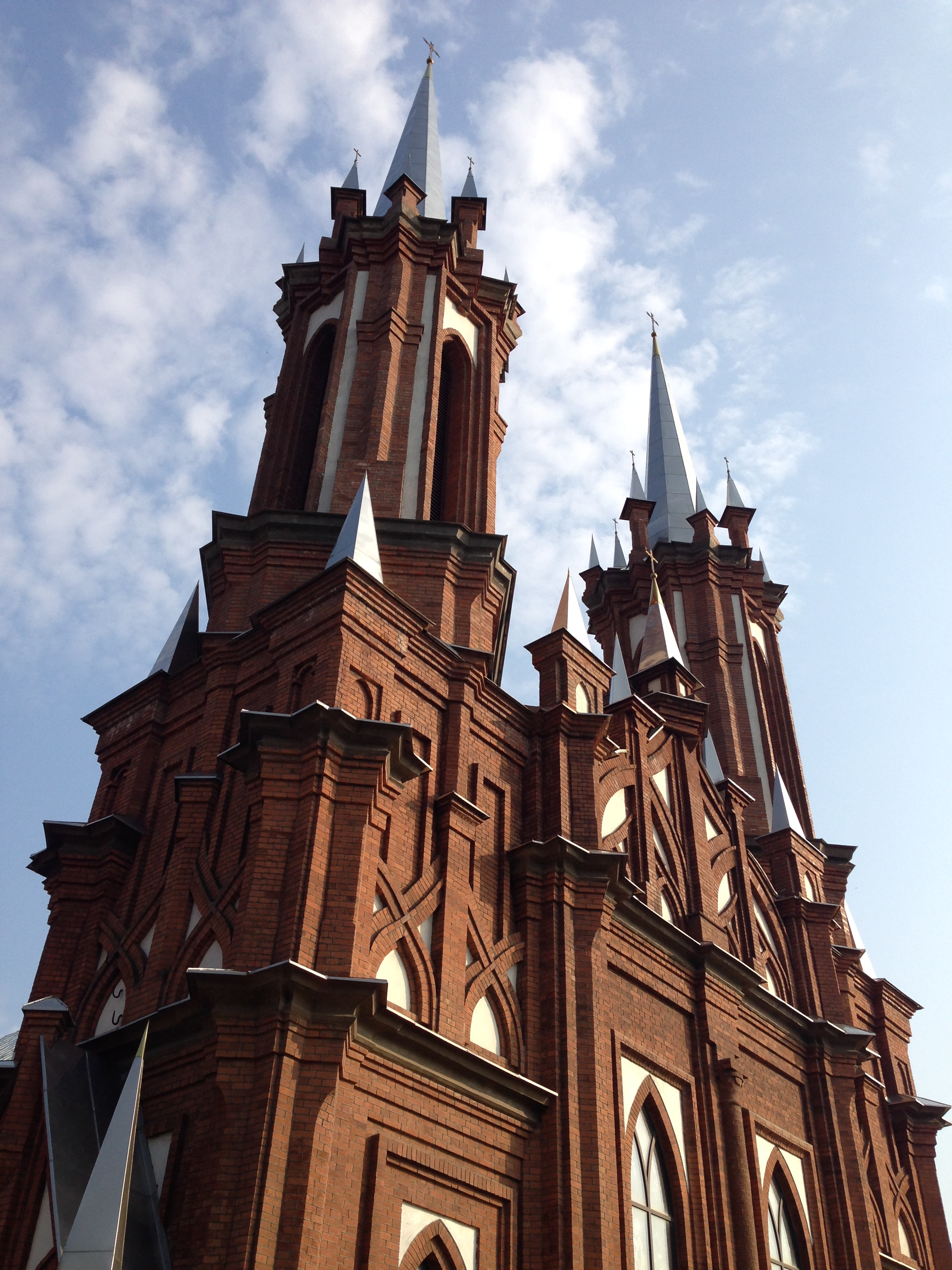 Католическая церковь Пресвятой Богородицы(Приморский край, Владивосток, улица Володарского, 22)